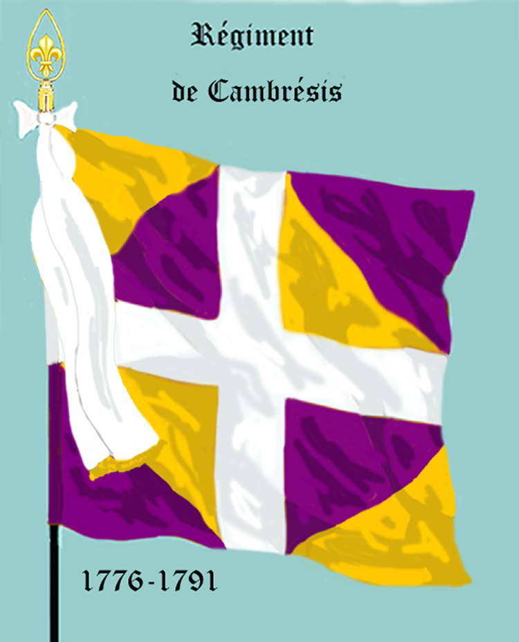 Ordonnanzfahne eines königlich französischen Infanterie-Regiments. - Entnommen und überarbeitet aus: „LES UNIFORMES ET LES DRAPEAUX DE L'ARMÉE DU ROI“ Marseille 1899. (Drapeau d'Ordonnance d' un régiment française d'infanterie royale.)